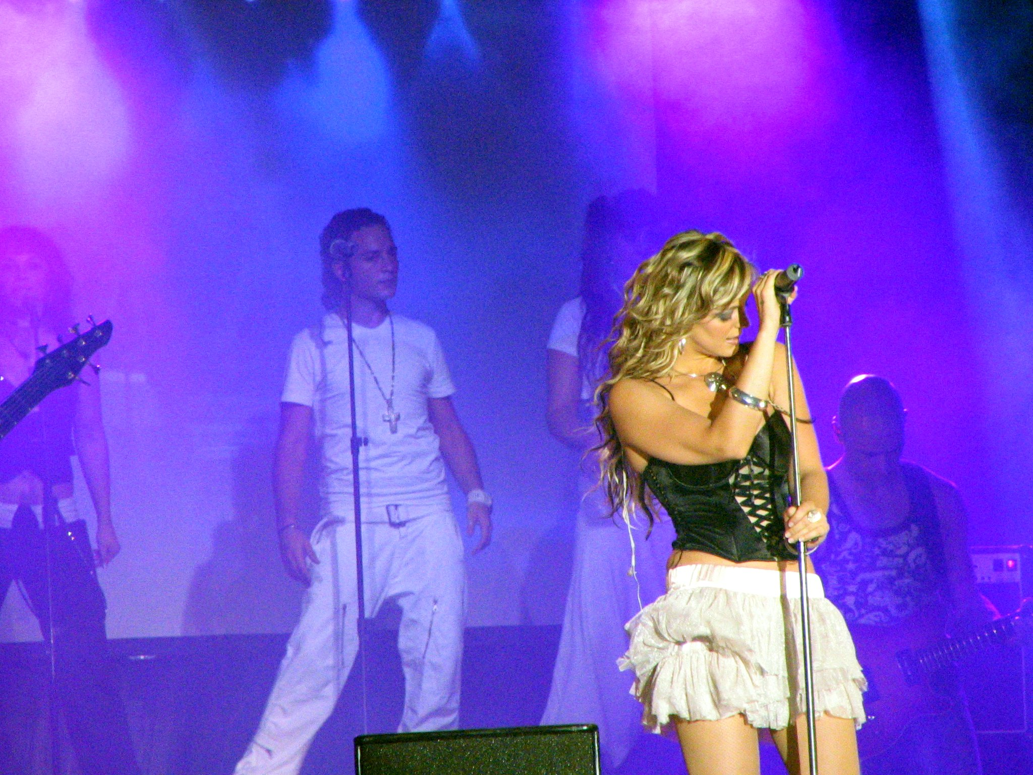 De casualidad me pilló el concierto de la muchacha ésta, Merche (aaaabre tu meeente...) en la caseta del ayuntamiento. ¿Y quién no le echa una fotico?La Merche haciendo poses